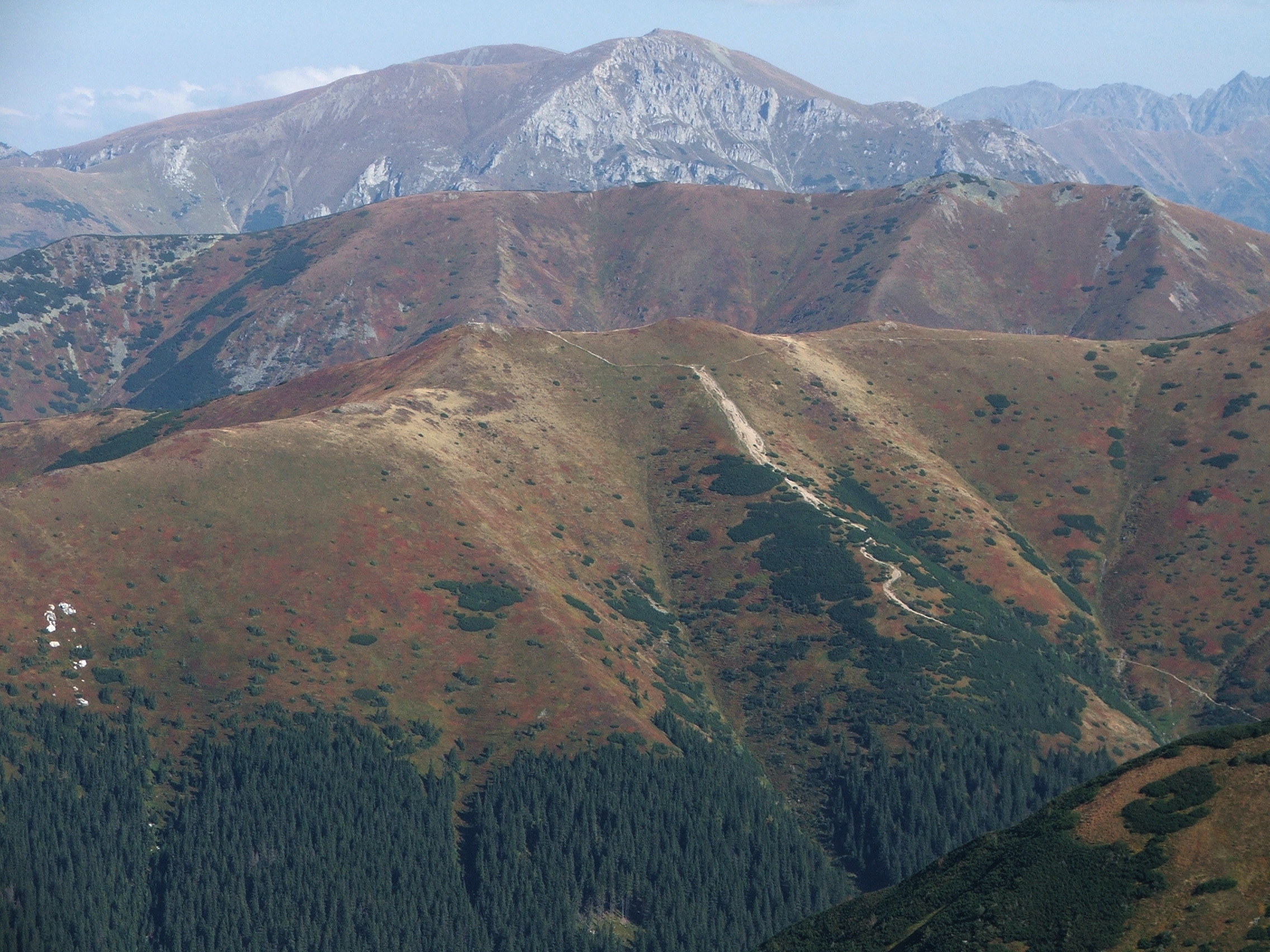 Ciemniak, Ornak, Trzydniowiański Wierch(West Tatra Mountains)